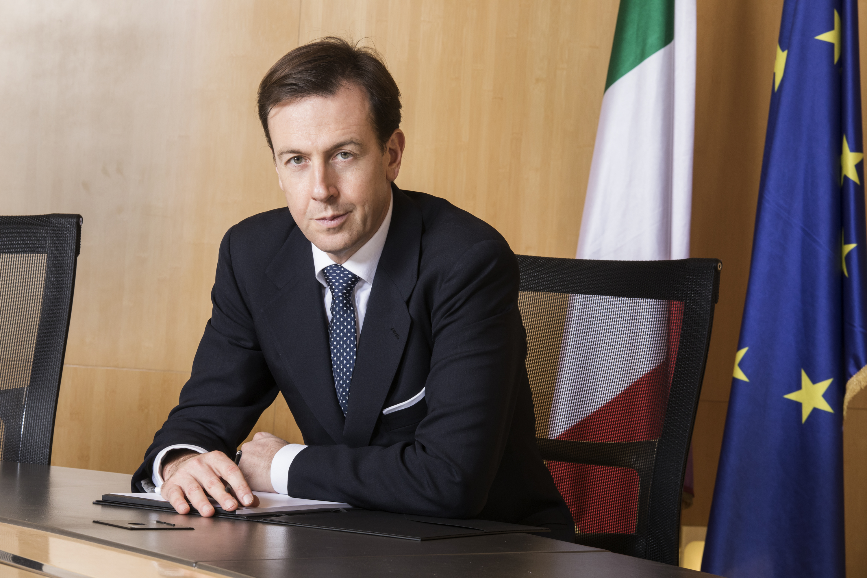 Dirigente